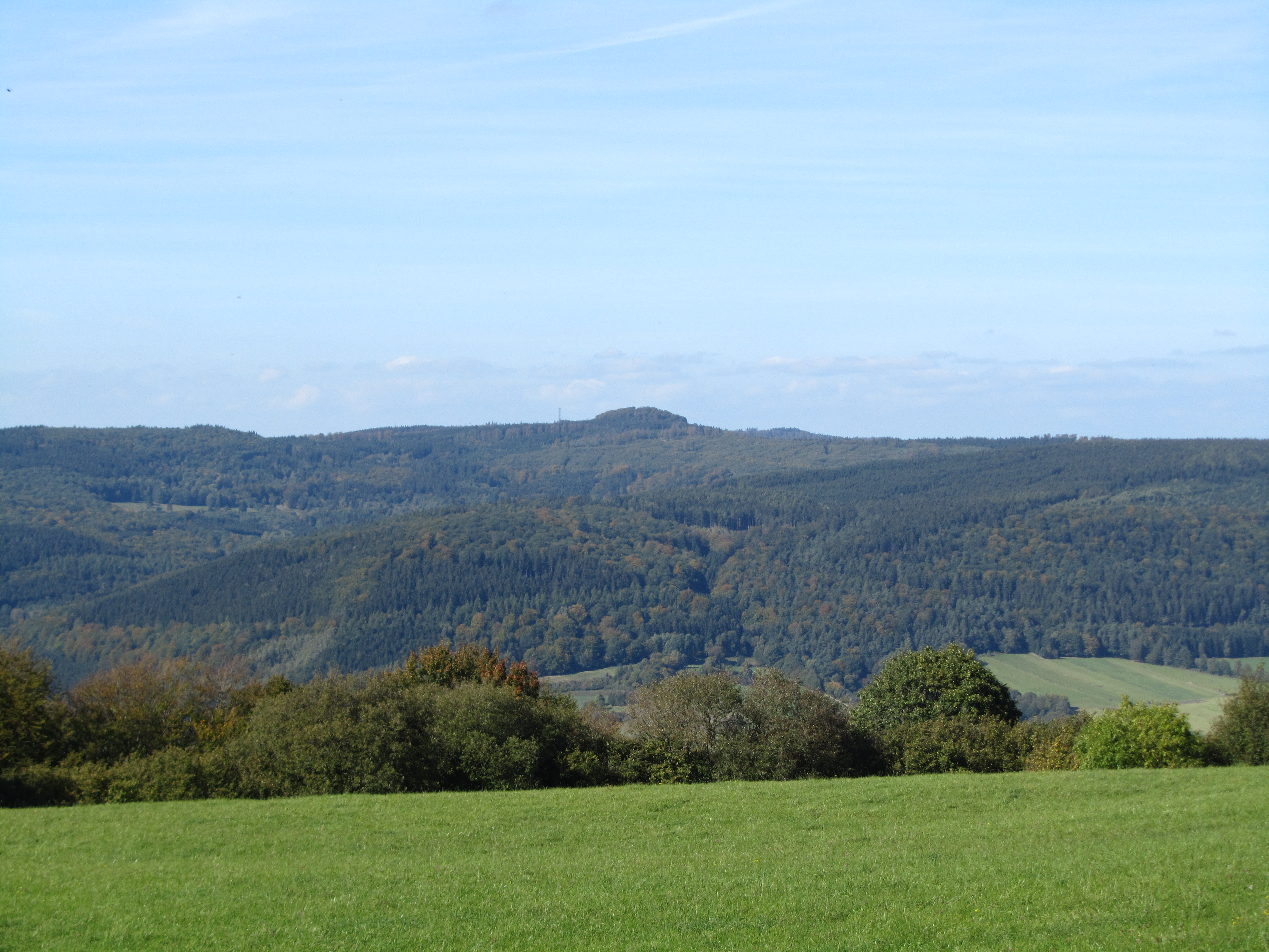 Der Bilstein im Kaufunger Wald von Südosten; unmittelbar rechts daneben die Große Kappe